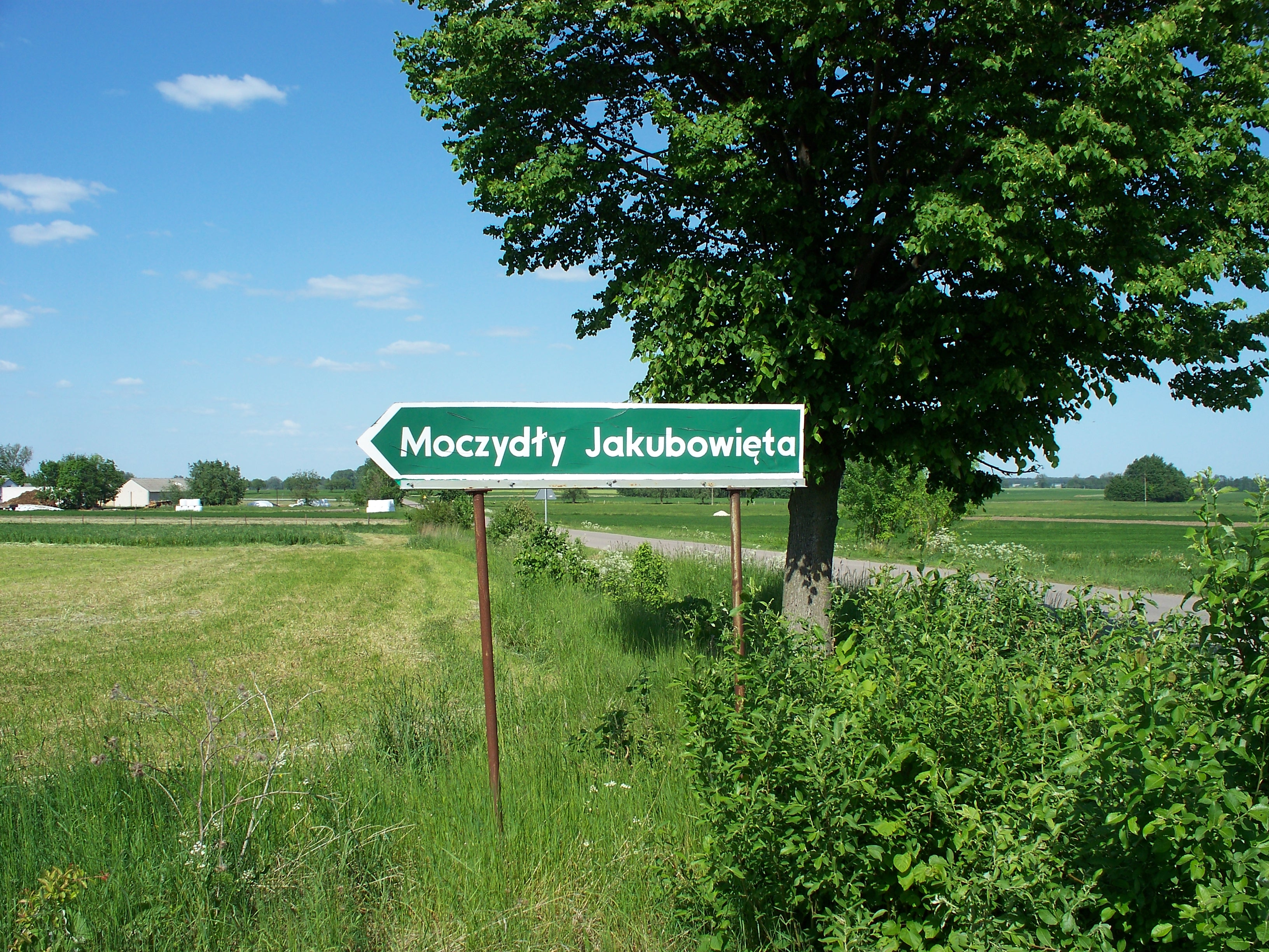 Miejscowość posiada ciekawy układ przestrzenny oraz zachowane budynki drewniane.